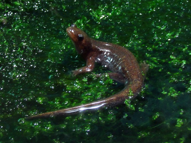 トウホクサンショウウオ 浅虫水族館展示